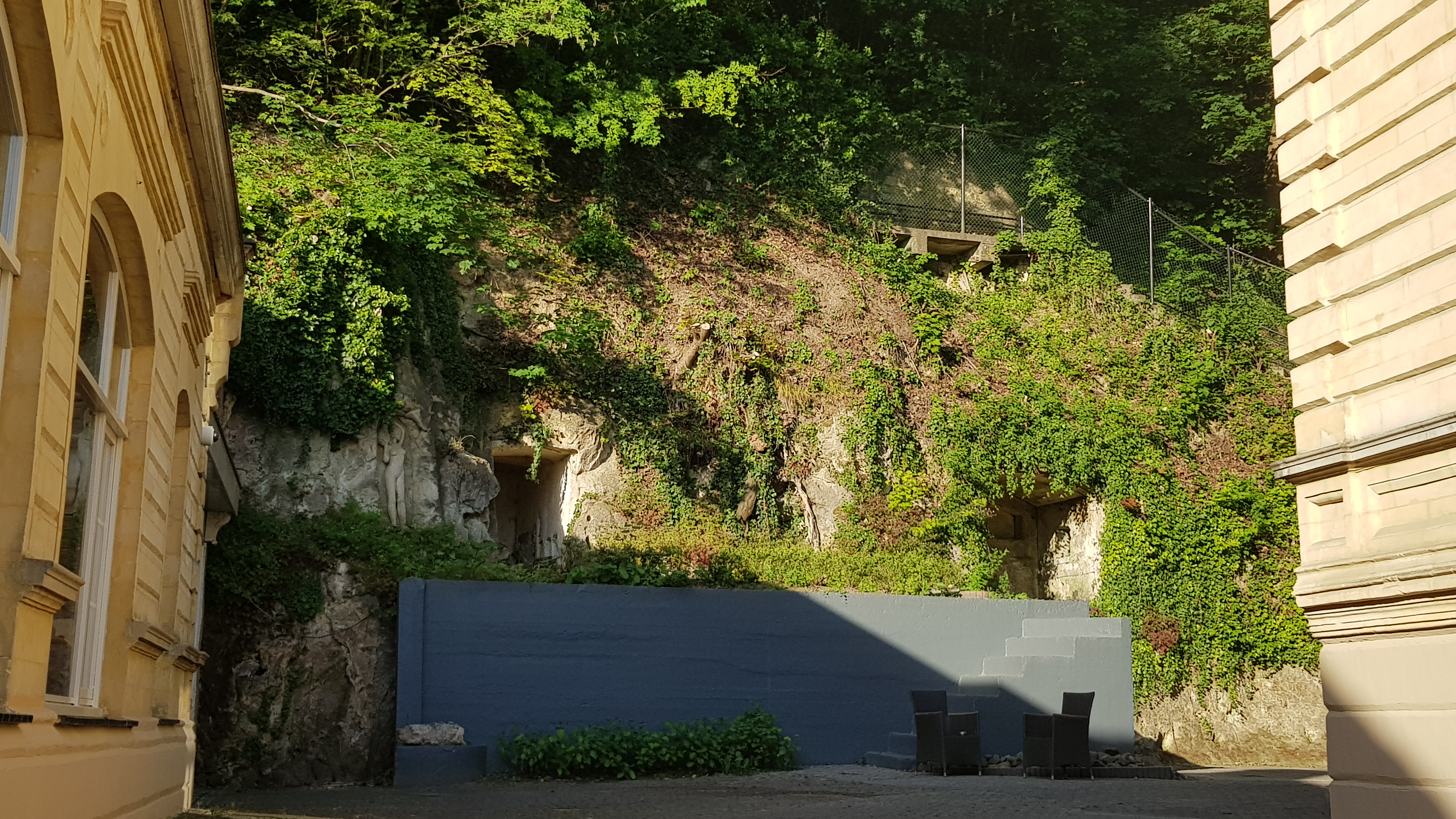 Bergkelders Villa Alpha, Valkenburg aan de Geul, Nederland